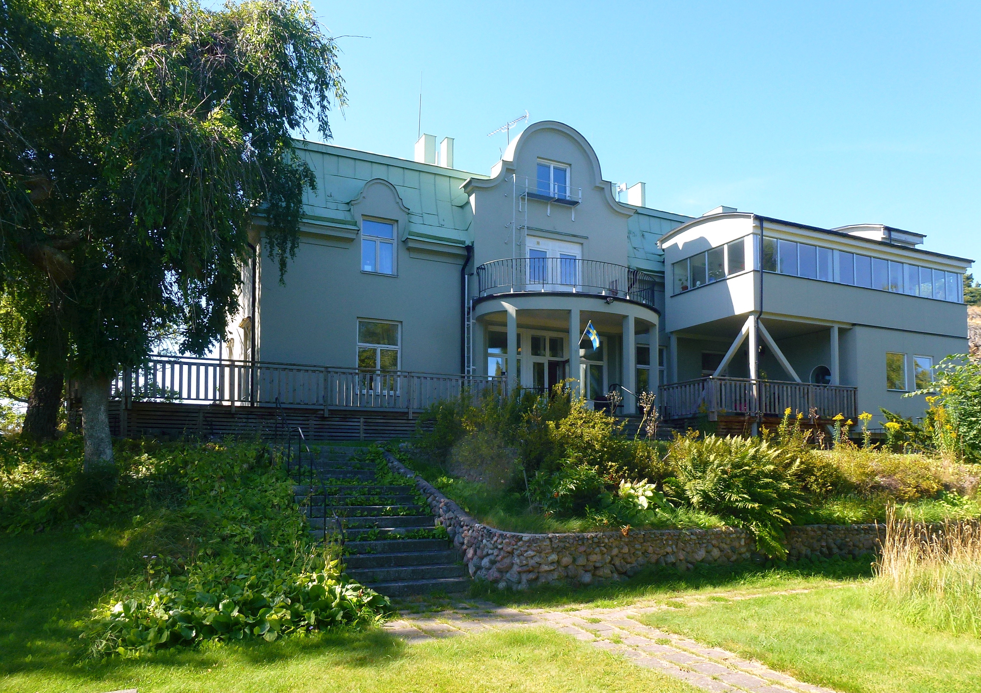 Gammeluddens hem, ursprungsbyggnad "Schnells villa"